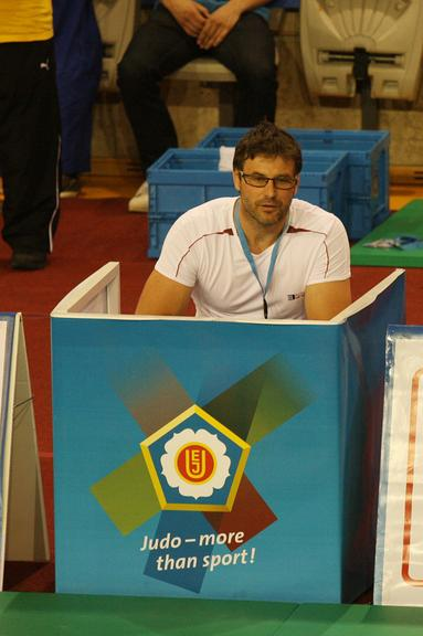 Trenér Petr Lacina